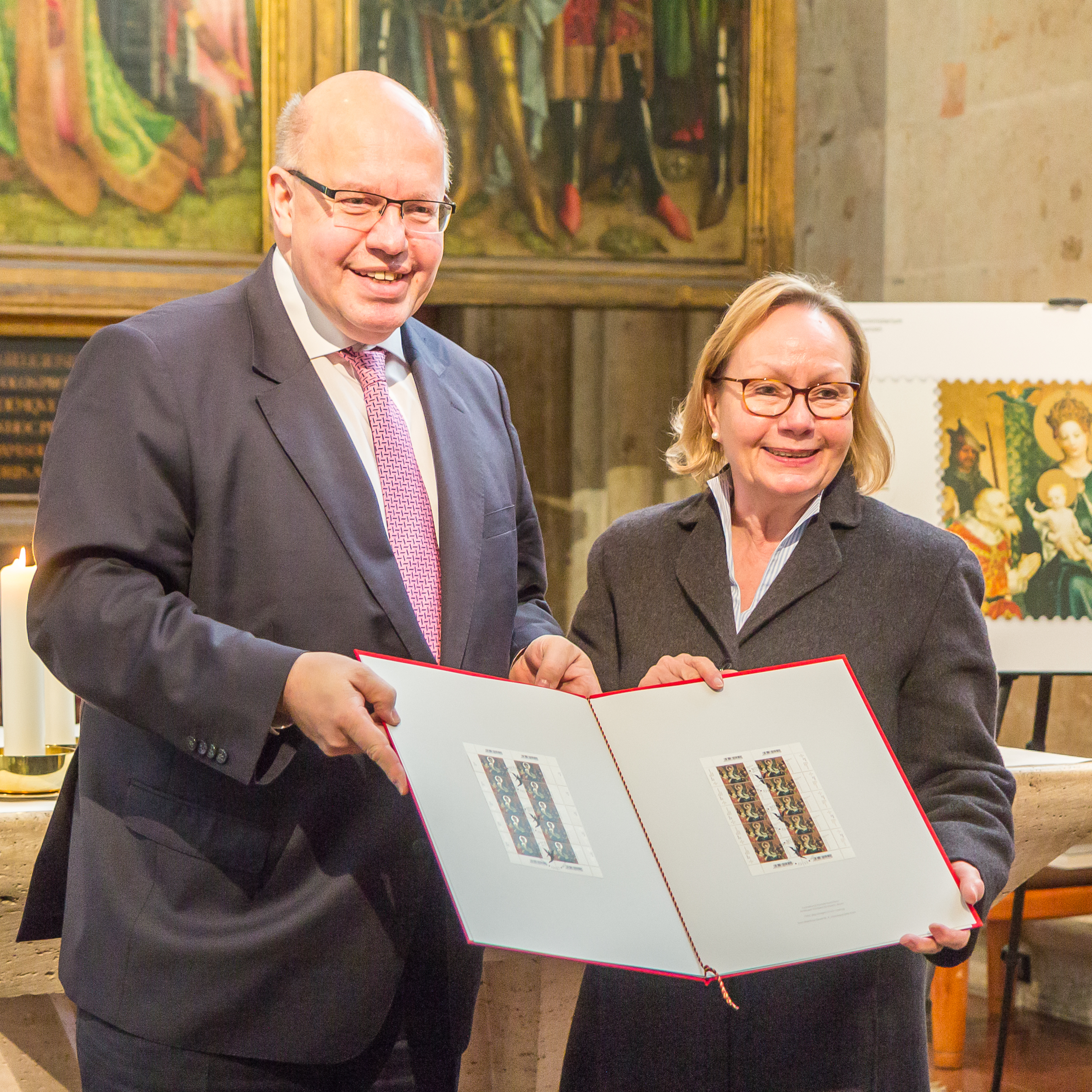 Vorstellung der Sonderbriefmarke „Weihnachten 2017“. Das Postwertzeichen zeigt einen Ausschnitt des von Stefan Lochner gestalteten Altars der Stadtpatrone in der Marienkapelle des Kölner Doms. Foto: Übergabe eines roten Albums mit Erstausgaben des Sonderpostwertzeichens an Margarete Gräfin von Schwerin, Präsidentin des Oberlandesgerichts Köln, durch Peter Altmaier, geschäftsführender Bundesminister der Finanzen